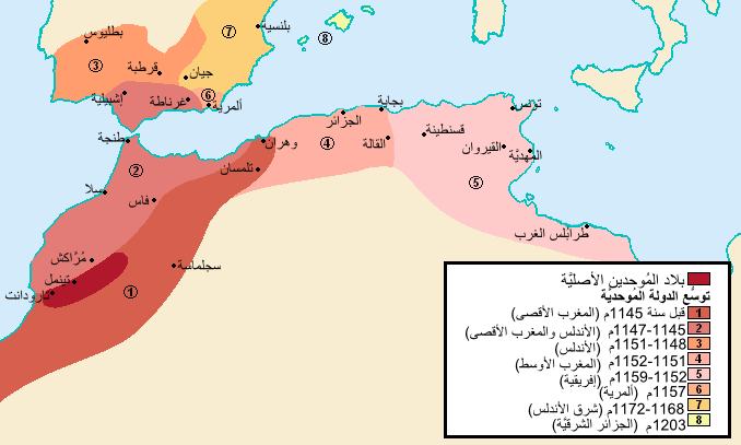 خارطة تُظهرُ مراحل توسُّع الدولة المُوحديَّة في المغربين الأوسط والأقصى، وفي إفريقية والأندلُس.